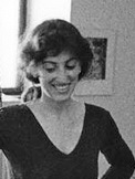 Příprava výstavy "Helene Binet - Příbuzní" , Praha, Galerie Jaroslava Fragnera, září 1991 – Helene Binet, John Hejduk